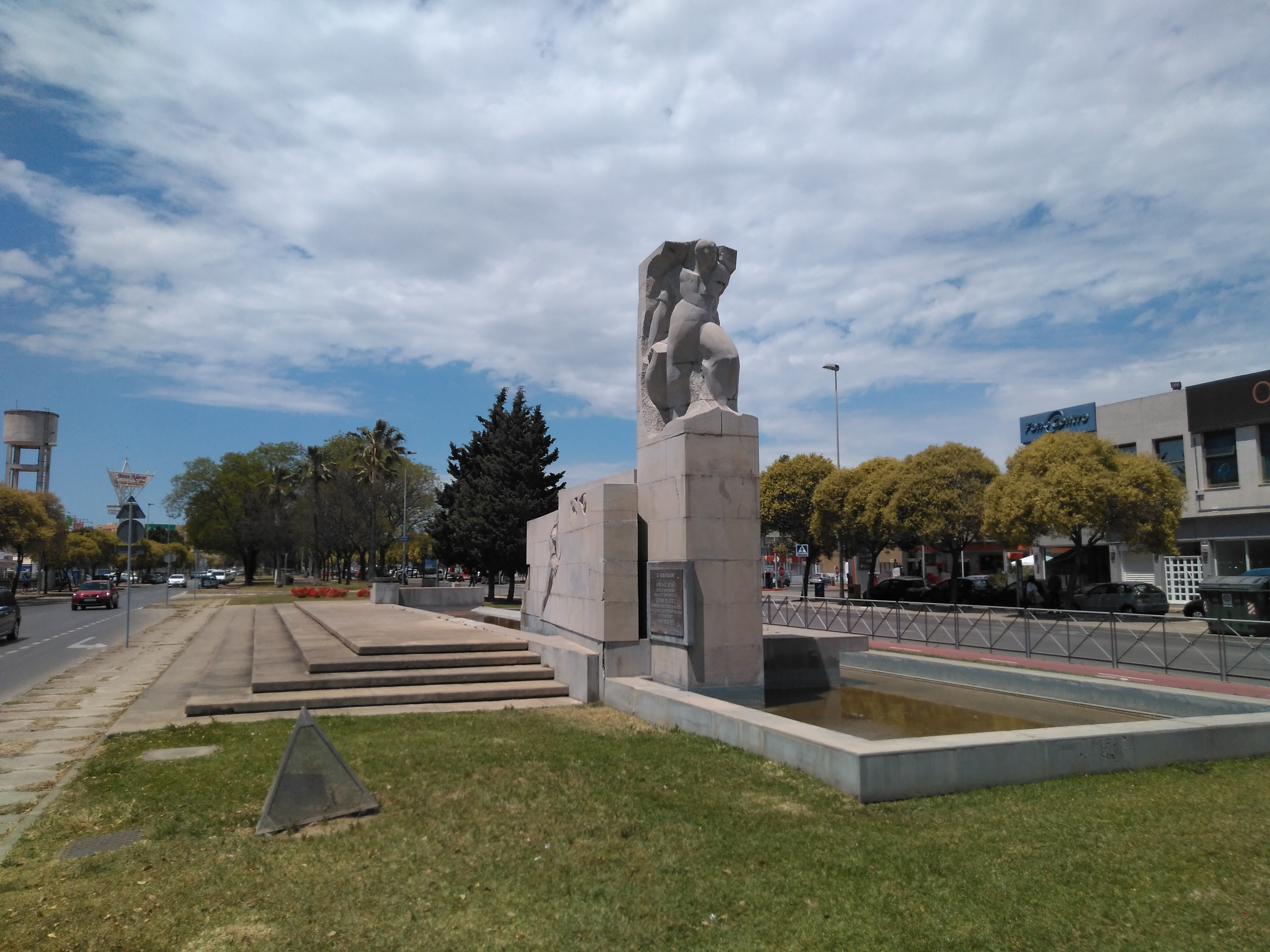 Monumento al Arrumbador de Francisco Pinto Berraquero, en Jerez de la Frontera (Andalucía, España)